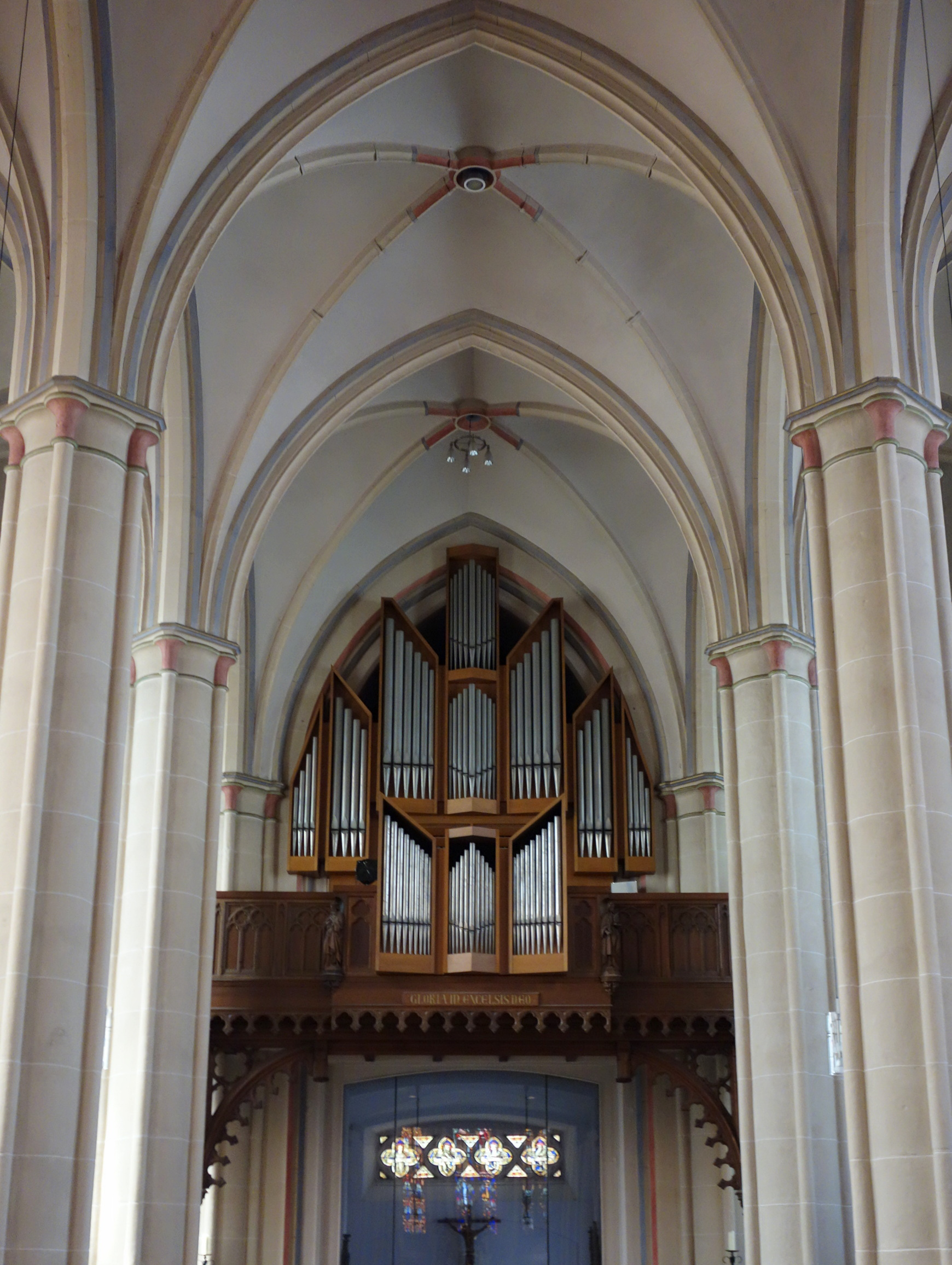 Orgel von St. Peter, Oldenburg, Niedersachsen, Deutschland